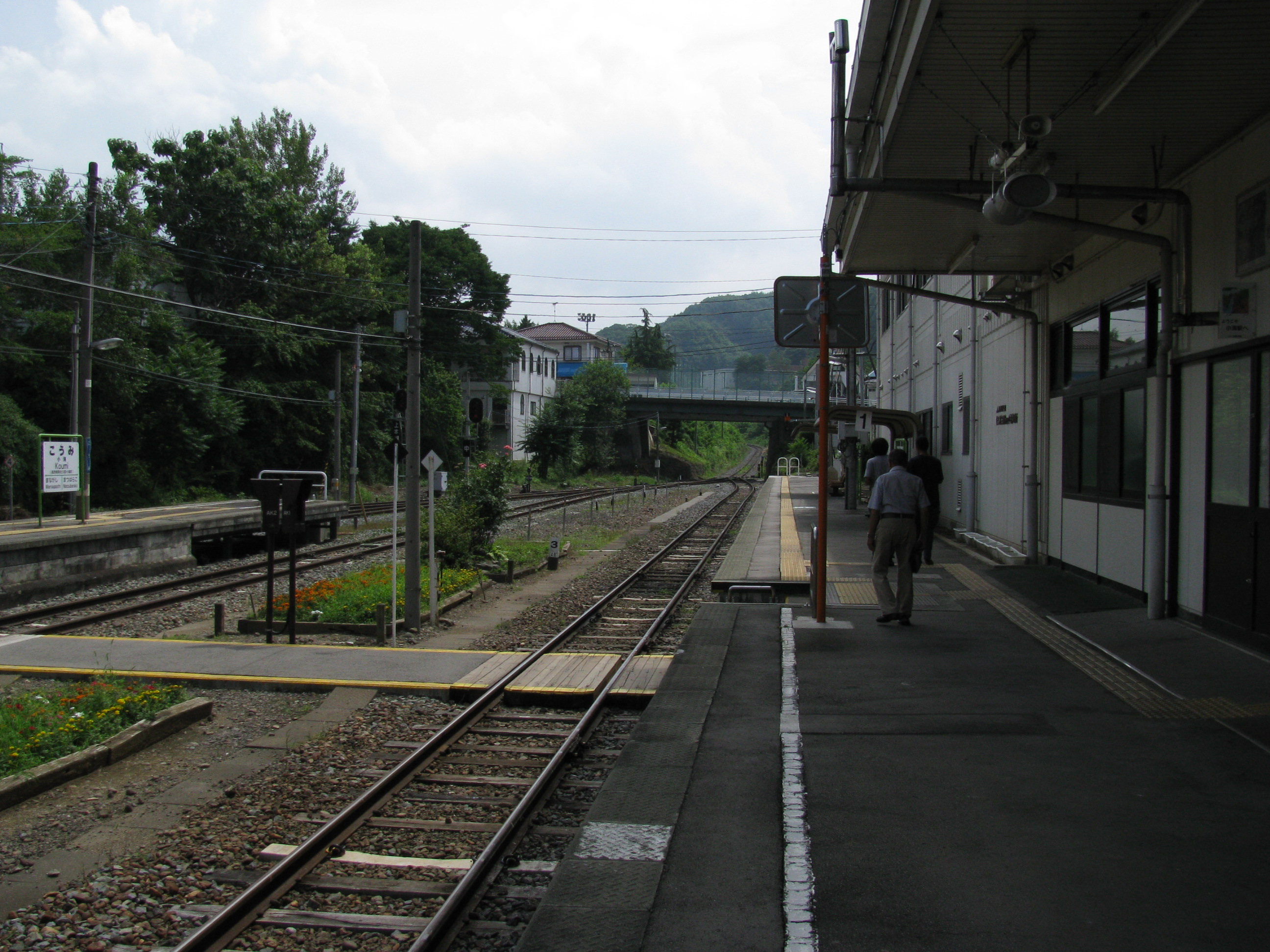 東日本旅客鉄道小海線ja:小海駅